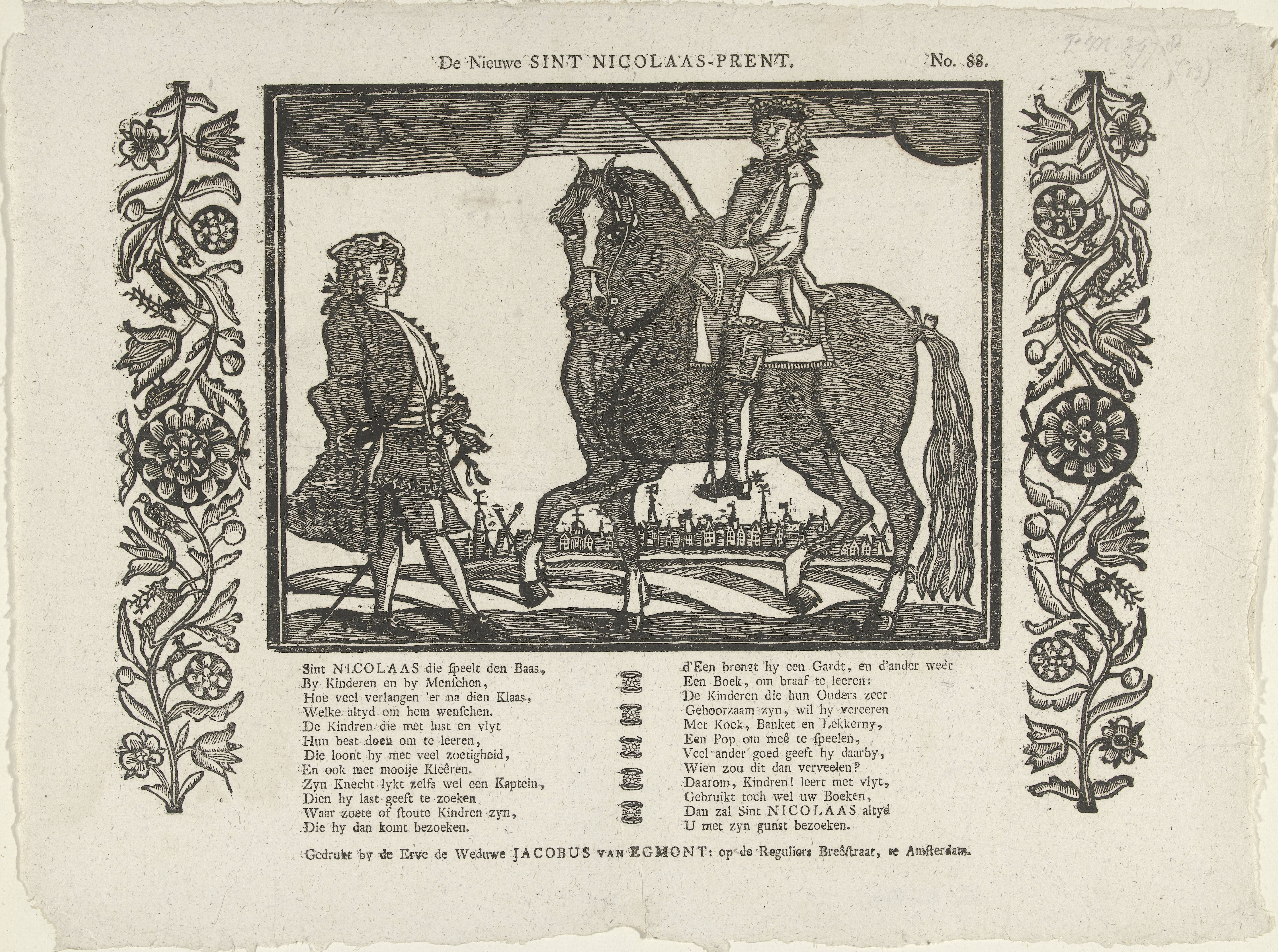 St. Nicolaas als hooggeplaatst persoon te paard met zijn knecht ernaast. Onder de voorstelling een rijm over Sint Nicolaas.